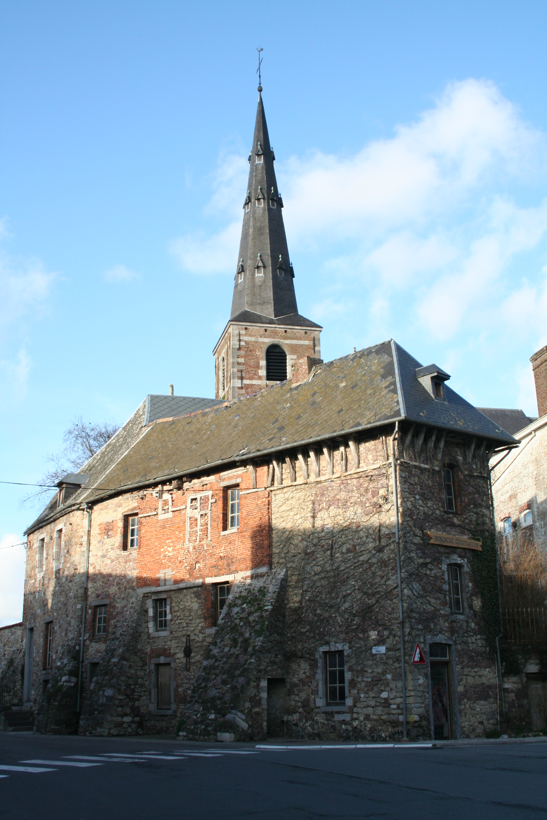 Vue de la Maison Forte et du clocher de l'Église Notre Dame de la Visitation de Nalinnes-Centre